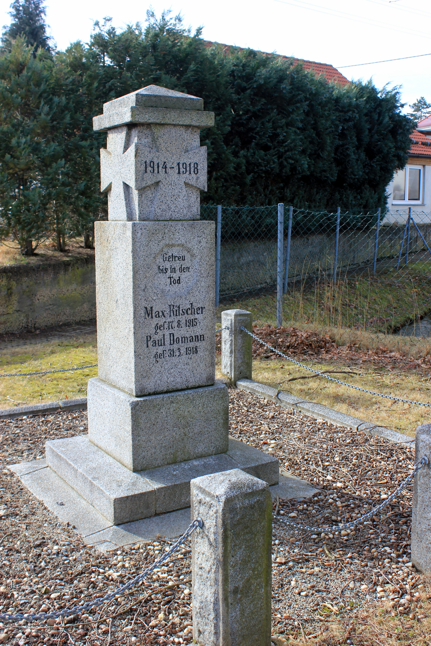 Hornjoserbsce: Wojerski pomnik w Bónjecach.